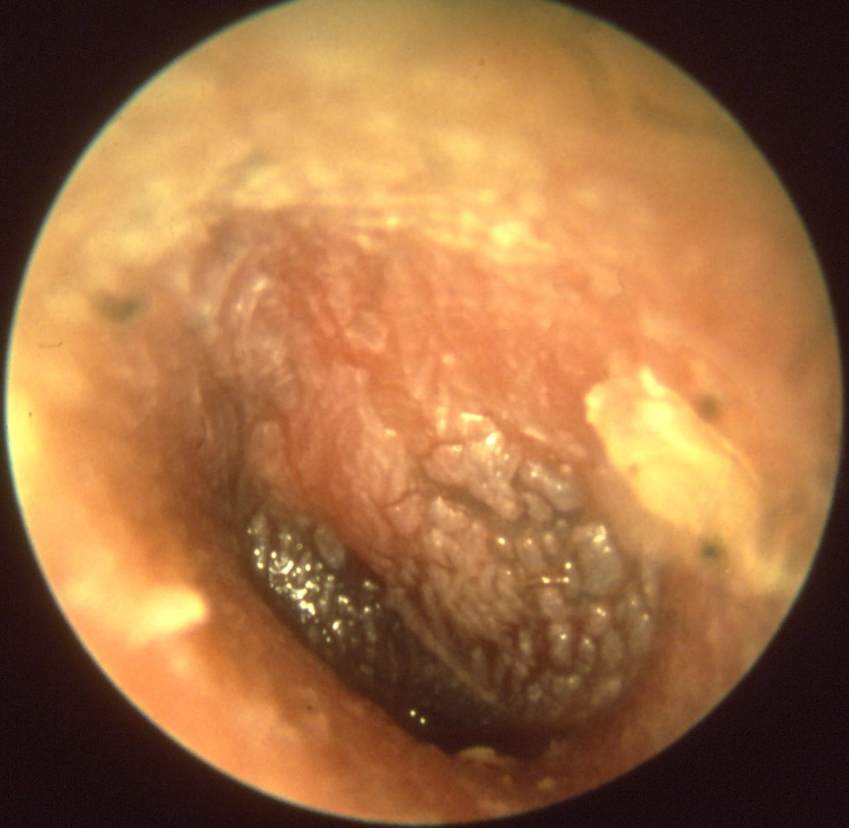 Otitis media acuta - "Schollige Trübung"